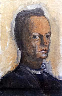 Василий Чекрыгин, автопортрет (1920).